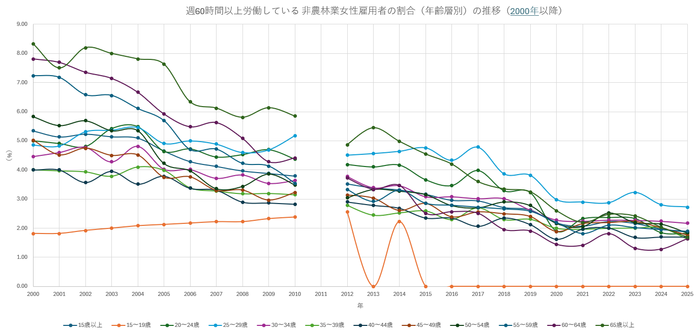 年齢階級別女性非農林業労働者に占める週60時間以上労働者の者が占める割合推移（2000年以降）